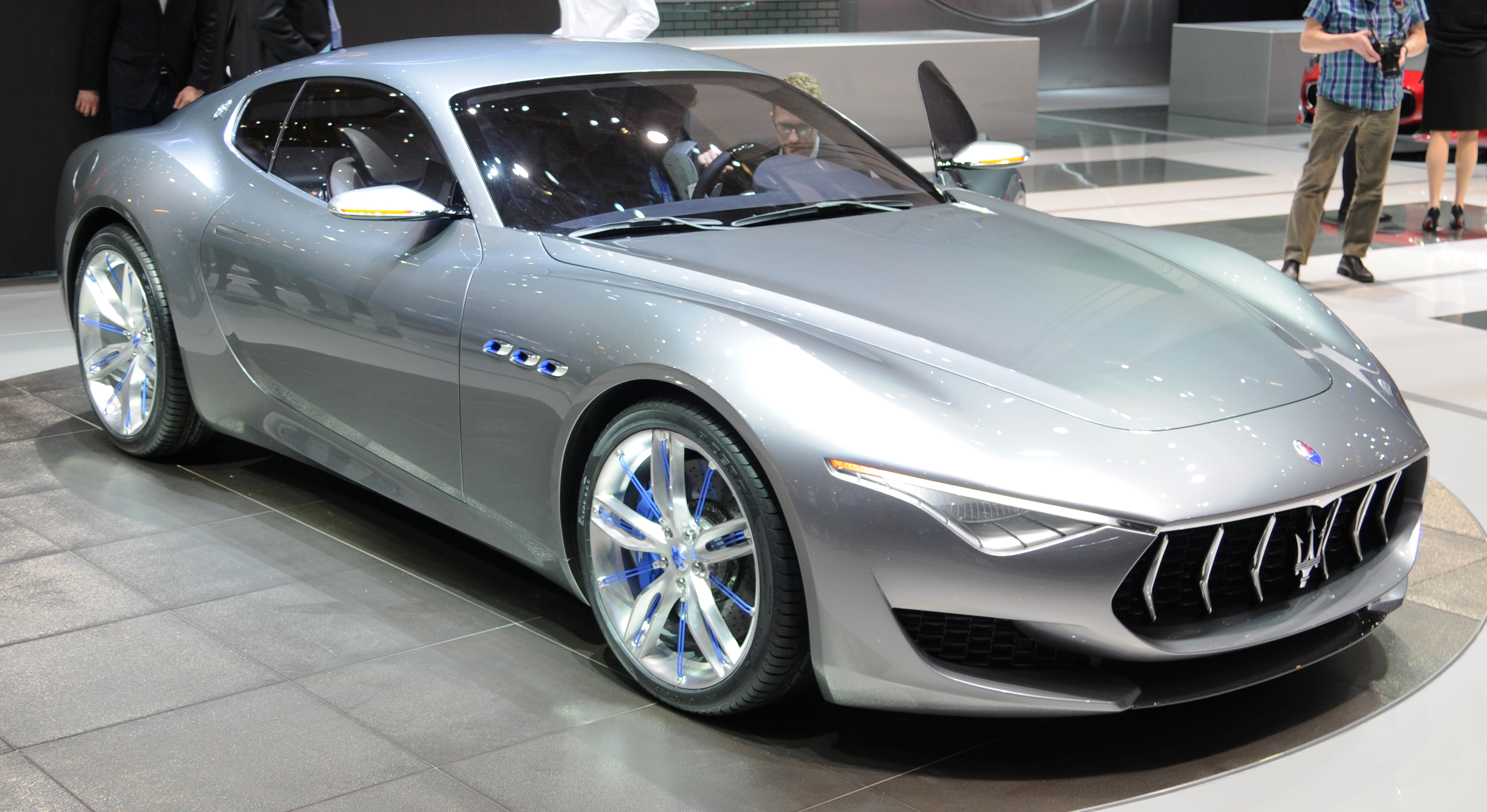 Maserati Alfieri al Salone dell'automobile di Ginevra 2014 (foto scattate durante il primo giorno dedicato alla stampa) autore: Noebu (cc-by-3.0) Opera derivata, file originale: [1]